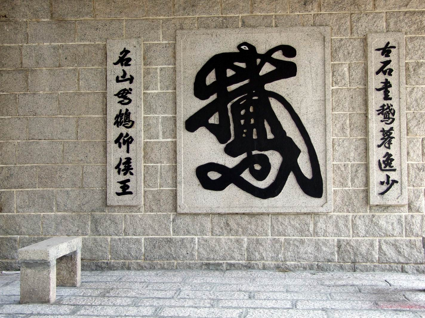 中文（香港）: 九龍城侯王廟「一筆鵝」摹刻